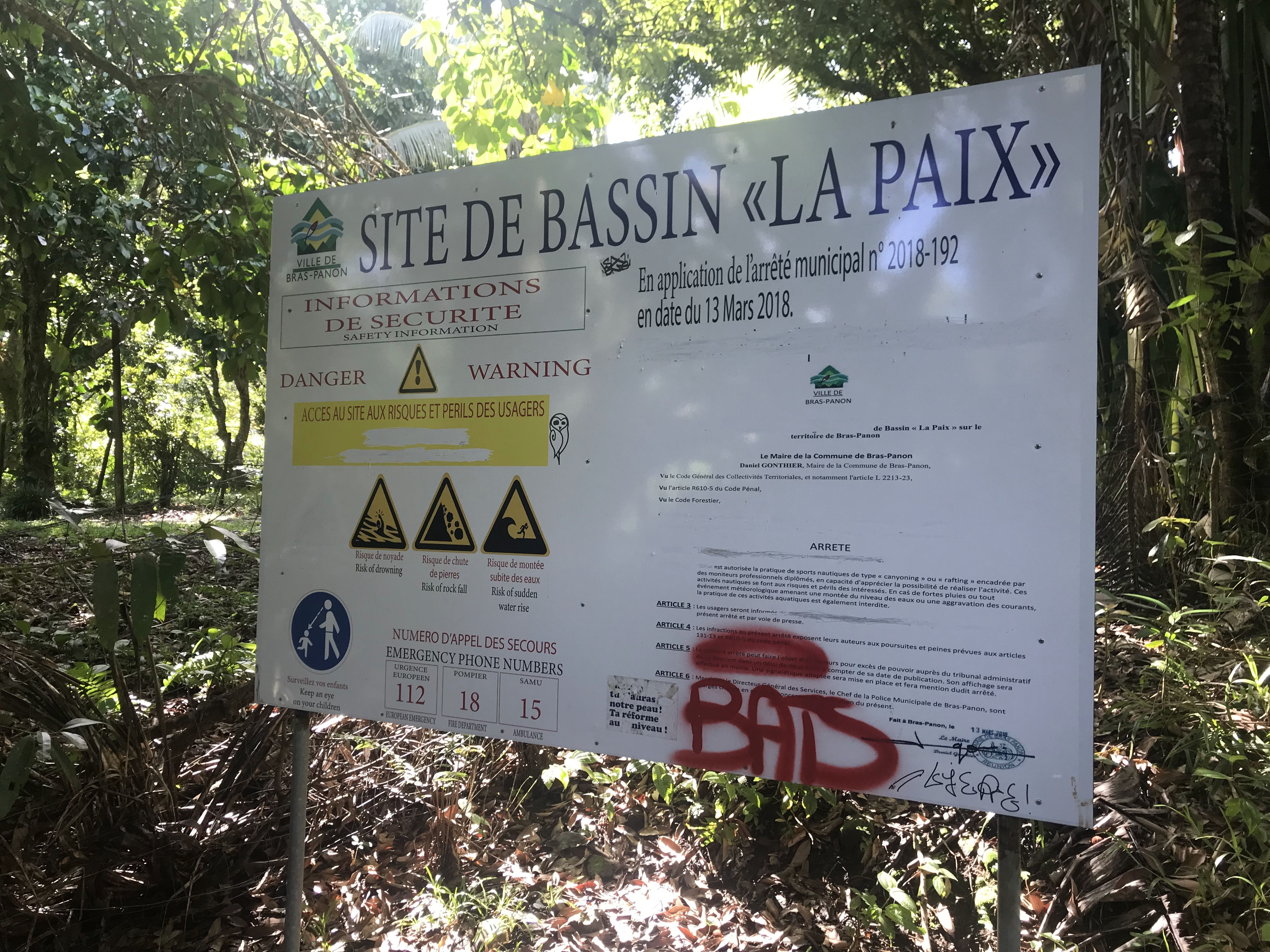 Panneau qui met en garde les personnes sur les dangers qui existent sur le site .